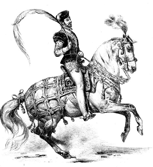 Représentation de Fiaschi